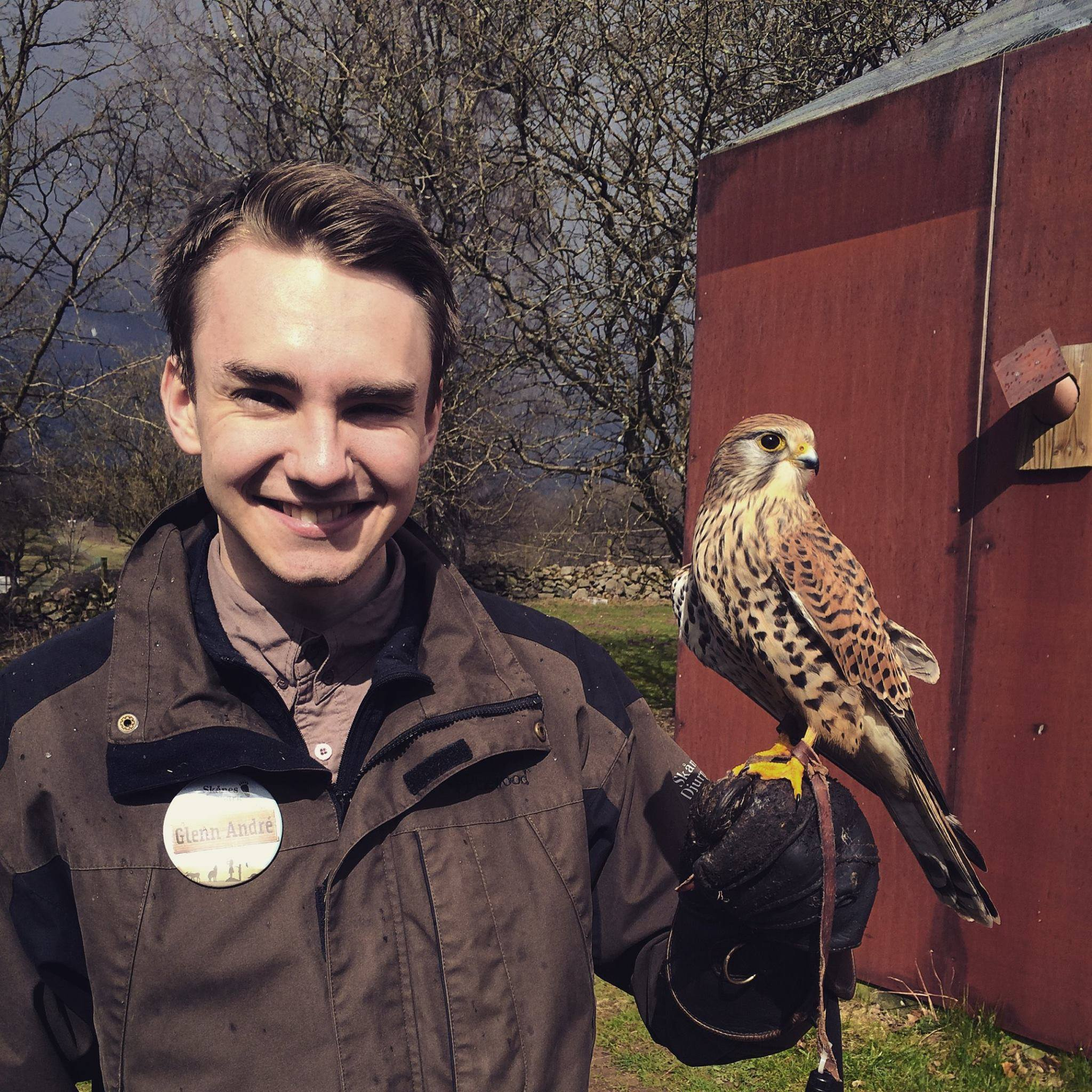 Glenn André Viste Bøe, som driftansvarlig på skånes djurpark, her med ørn.